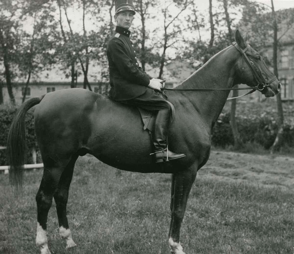 Olympische Spelen Los Angeles 1932. Ruiter Luitenant Jonkheer Aernout van Lennep op zijn paard..